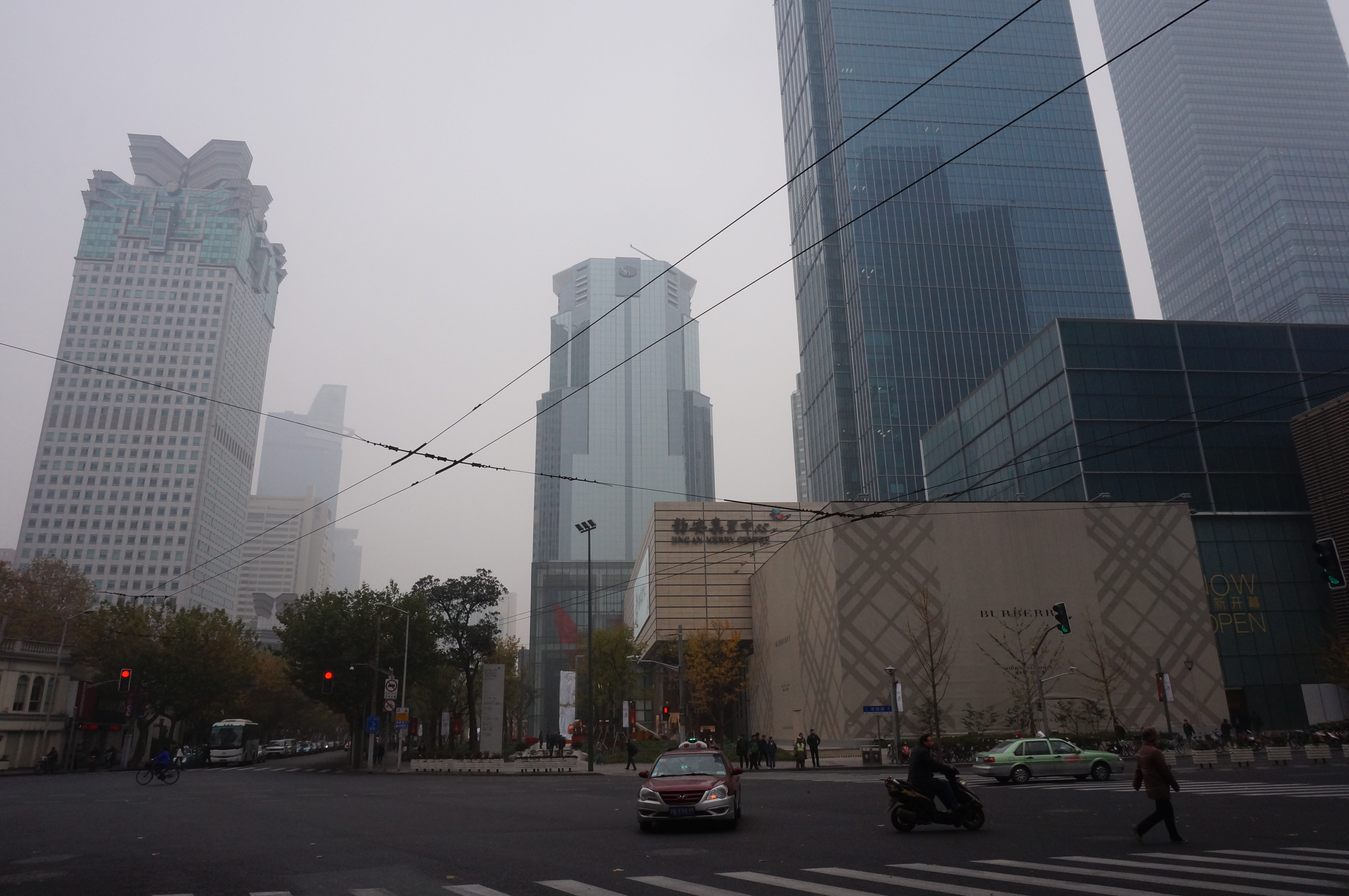 常德路南京西路口